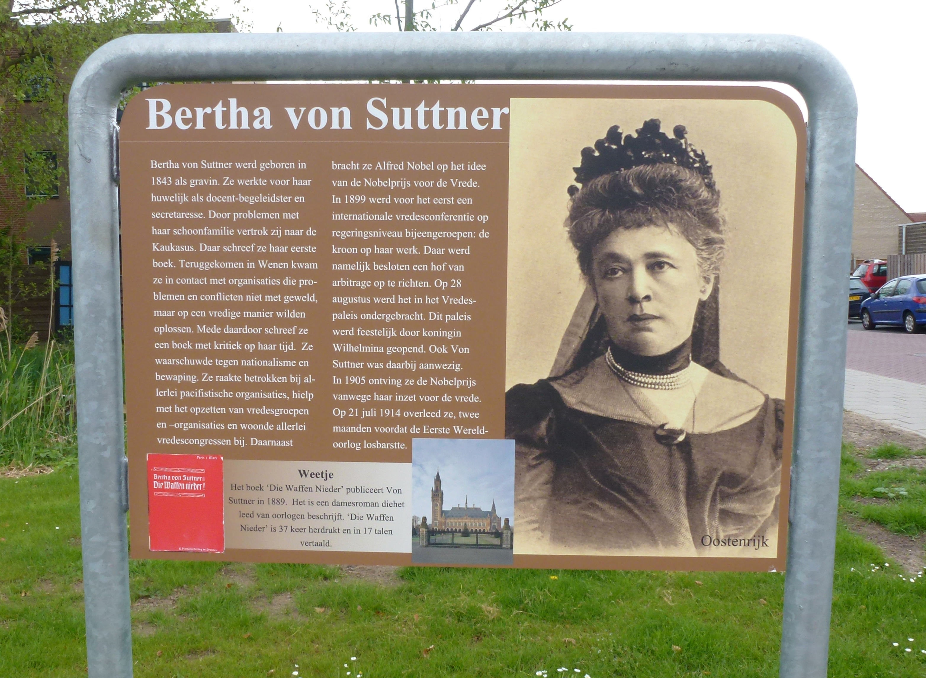 Bertha von Suttner, Nobelprijs voor de vrede. Het informatiebord is geplaatst (april 2018) in de naar haar genoemde straat in de buurt Oosterwei in Gouda